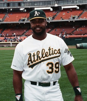 Former MLB outfielder Dave Parker .